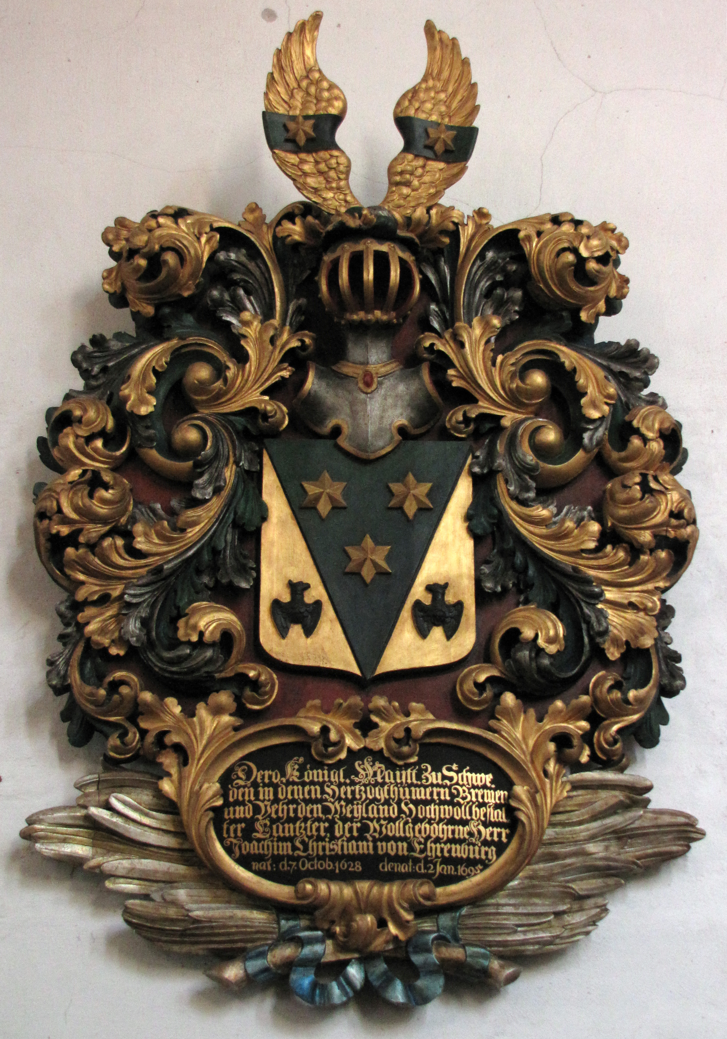 Joachim Christiani von Ehrenburgs epitafium i Ss. Cosmae et Damiani i Stade, Niedersachsen, Tyskland. Han var född 1628-10-07 i Greifswald, erhöll svenskt adelskap 1688, kansler i de svenska hertigdömena Bremen-Verden 1688–1695, död i Stade 1695-01-02.